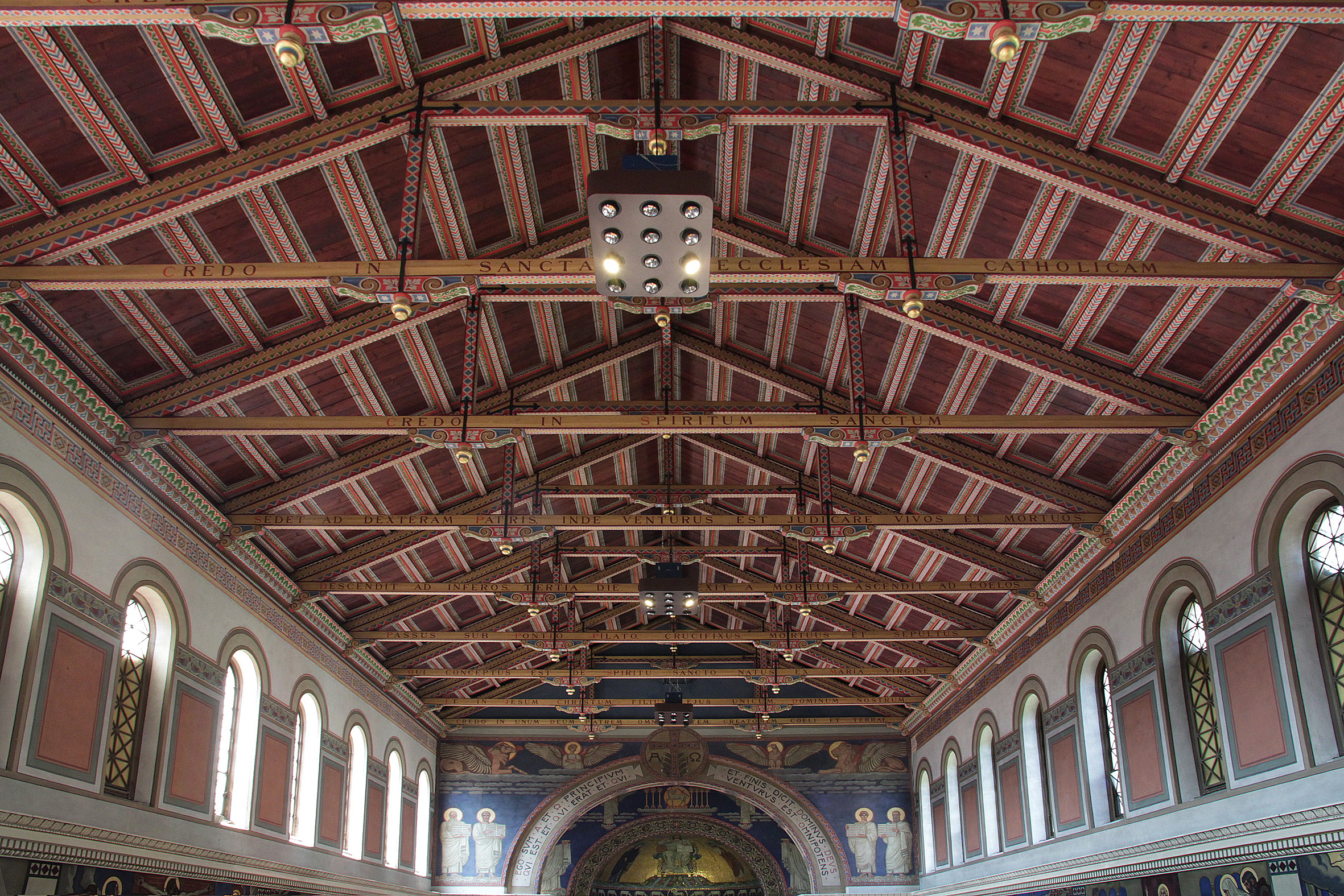 Römisch-katholische Kirche Liebfrauen Zürich